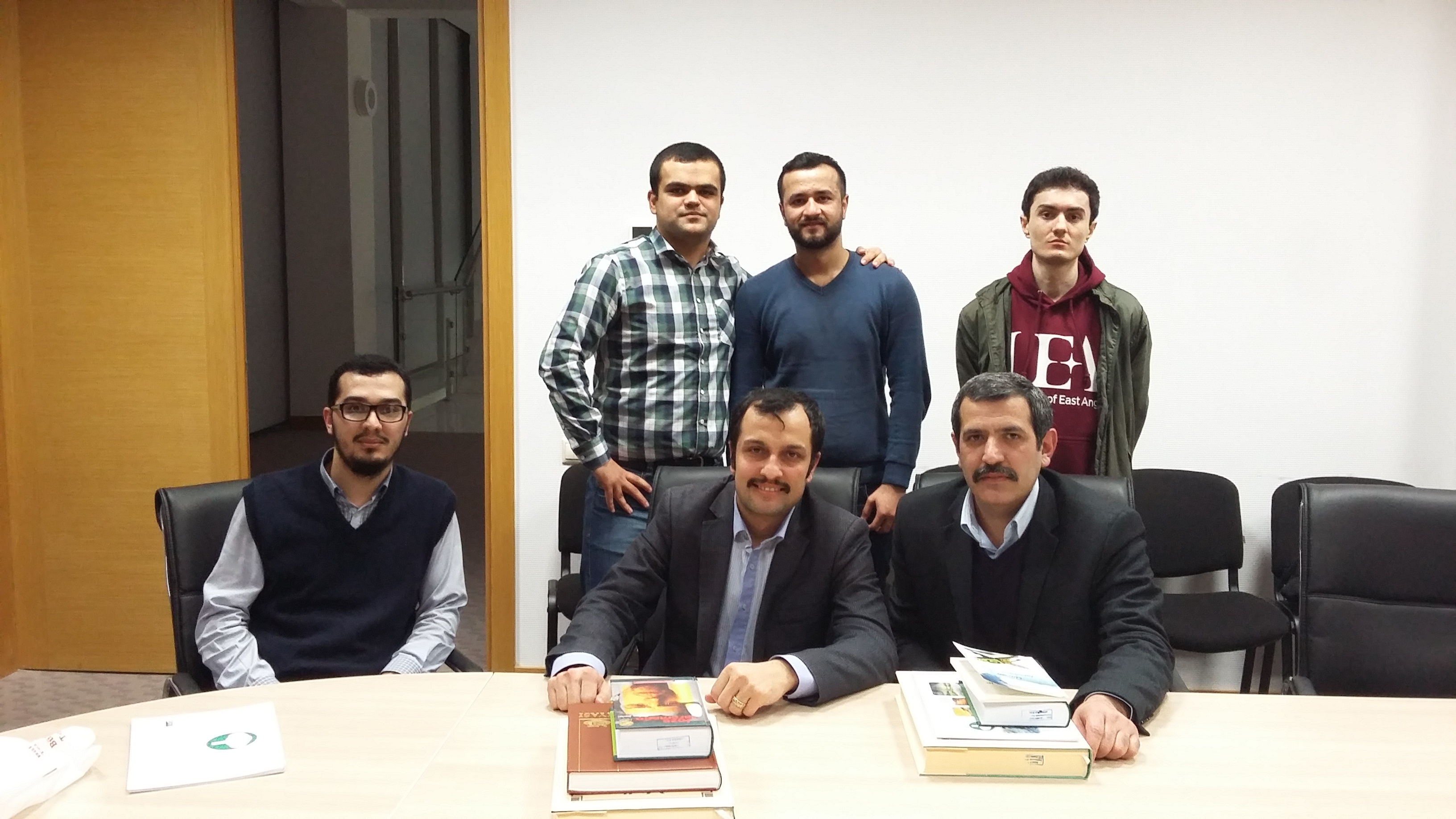 Azərbaycanca Vikipediya istifadəçilərinin AMEA-nın Mərkəzi Elmi Kitabxanasında görüşü. 2017.03.10. Şəkildəkilər:Samral, Cekli829, Araz Yaquboglu, Baskervill, Eldarado və Nicat49